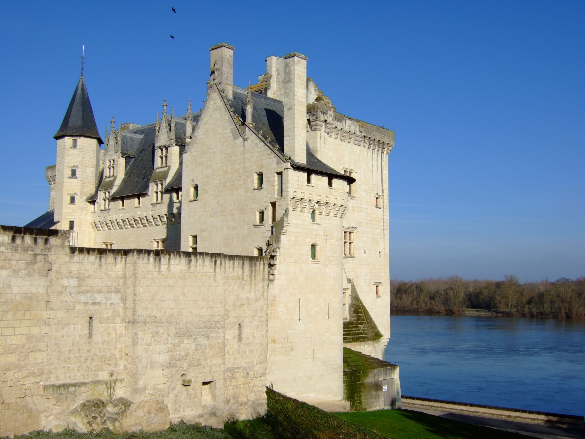 Le château de Montsoreau et la Loire